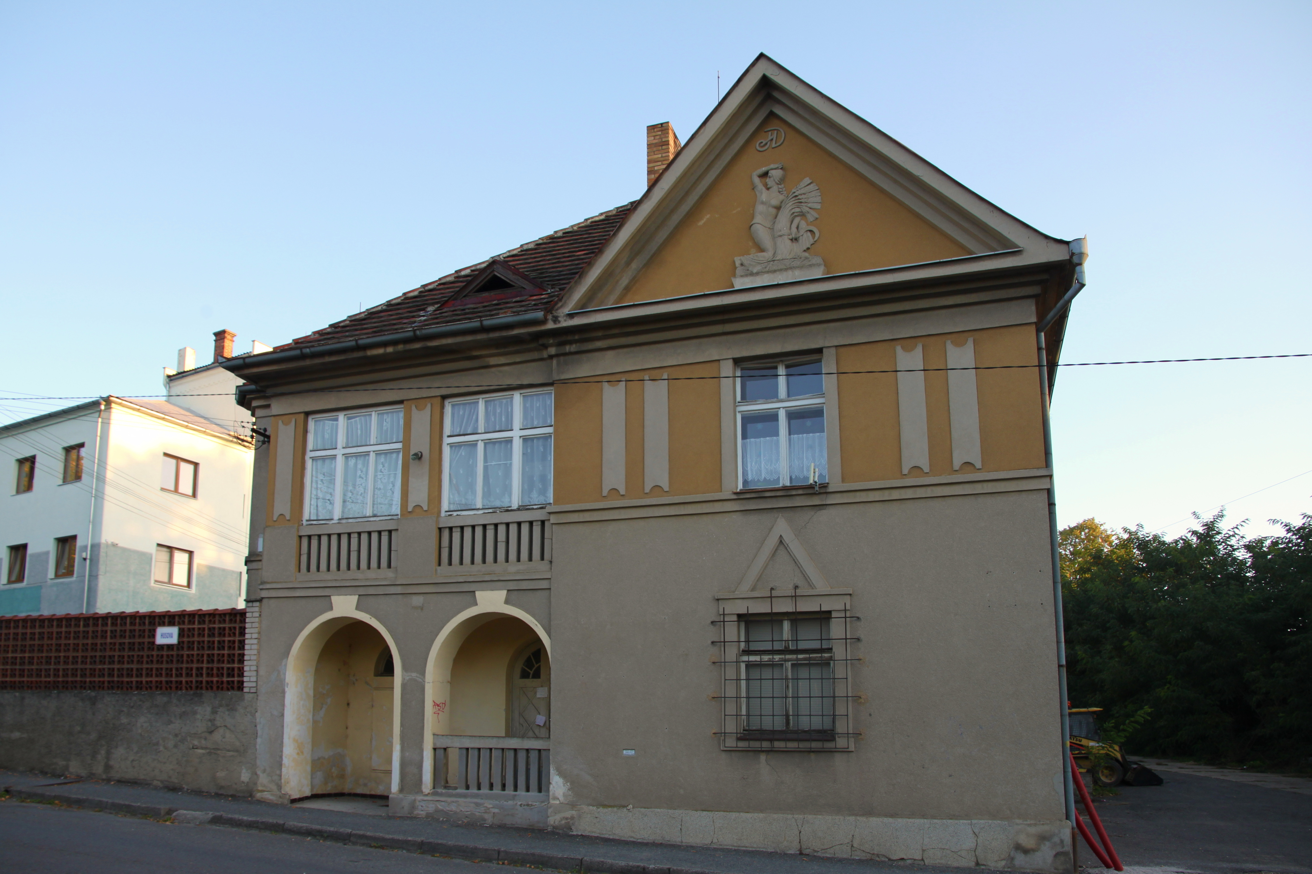 Obytný dům Hospodářského družstva v Husově ulici čp. 575 v Přešticích od architekta Hanuše Zápala.